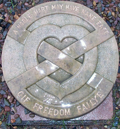 Melrose Abbey (Scotland), marker for burial of the heart of Robert the Bruce